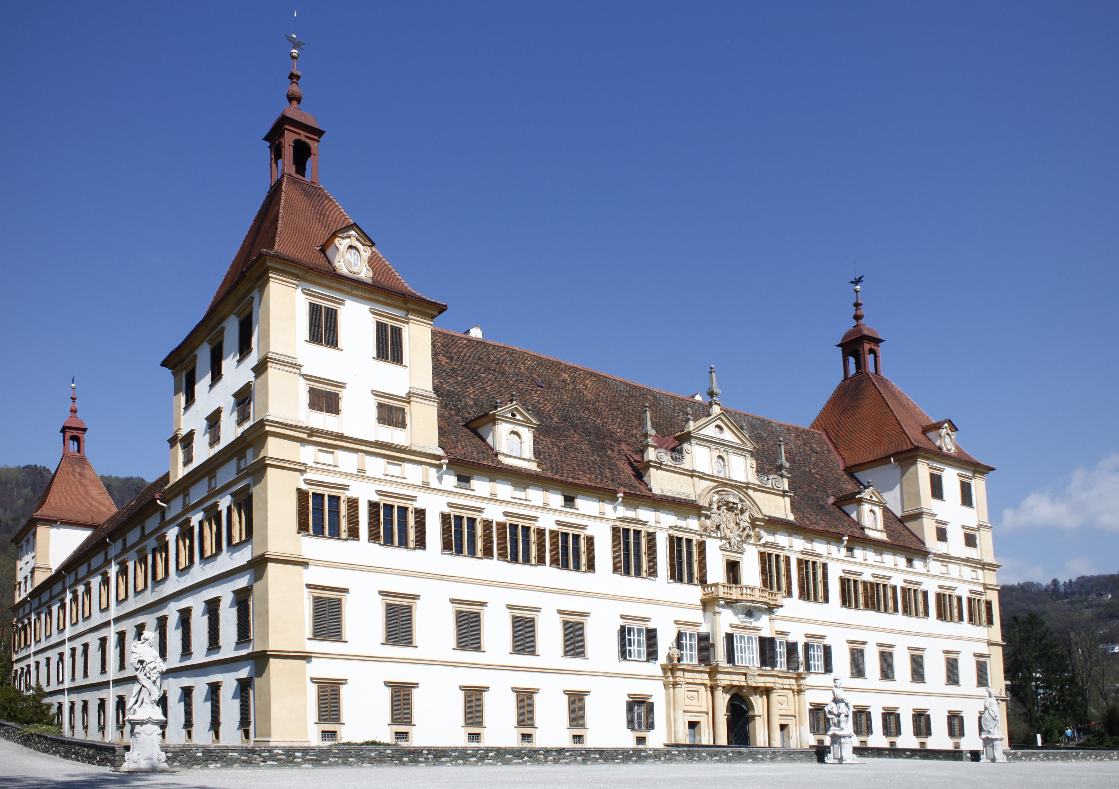 Schloss Eggenberg samt Park